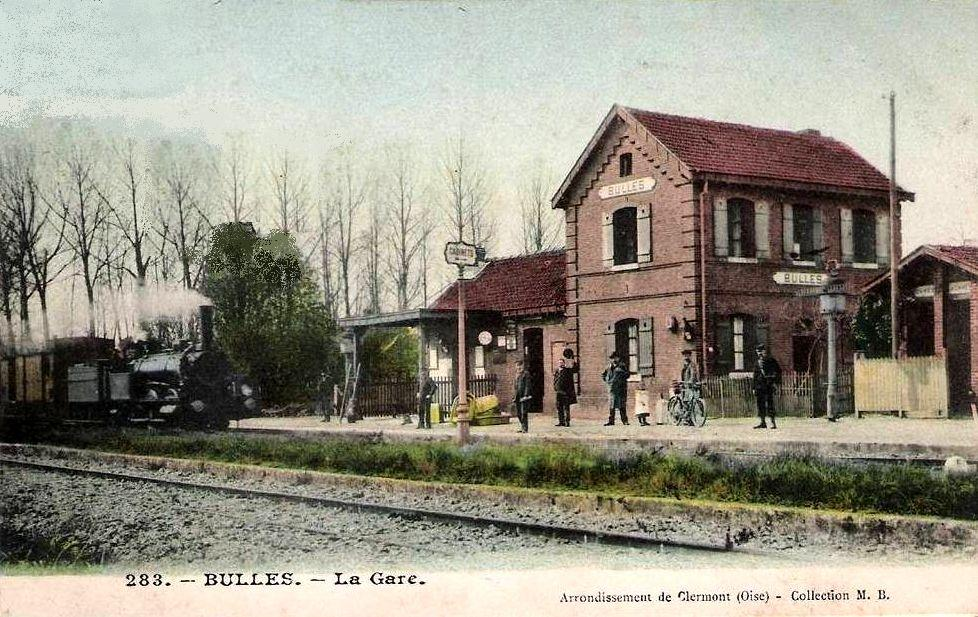 Train entrant en gare de Bulles, vers le début du XXe siècle. La voie au premier plan est apparemment factice, car d'autres photos de la gare montrent pas de voie à cet endroit.